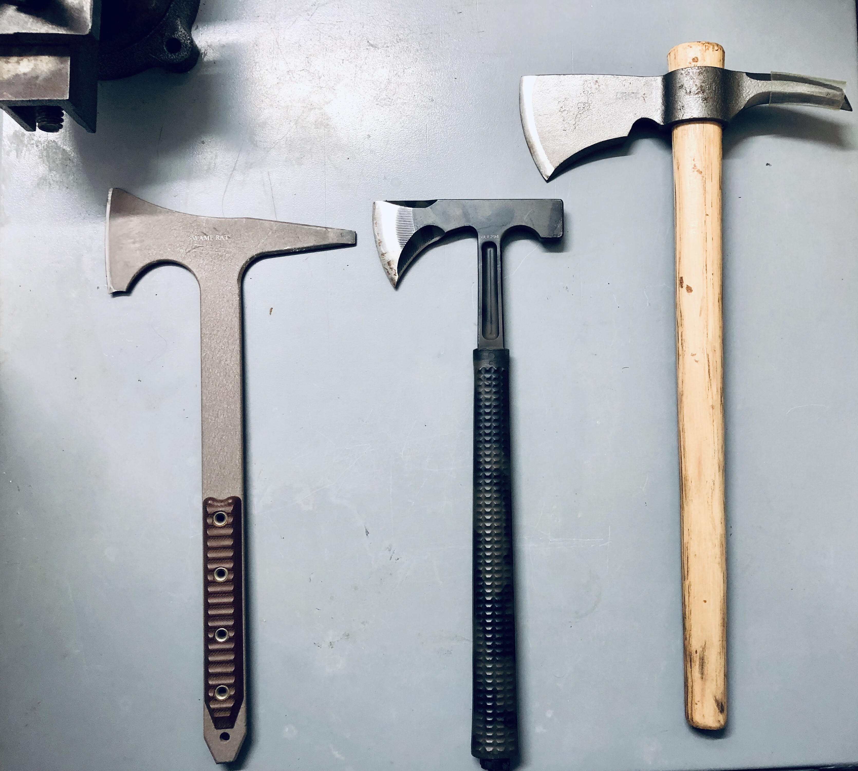 טומהוקים מודרנים